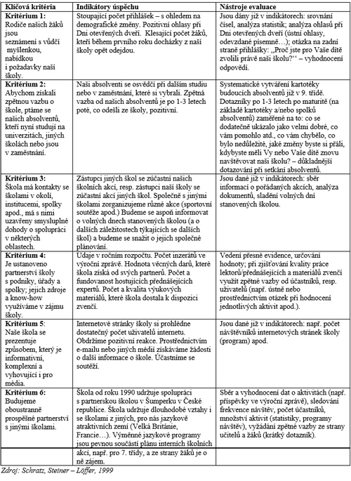 Příklad autoevaluace školy - Propojení naší školy s vnějším světem